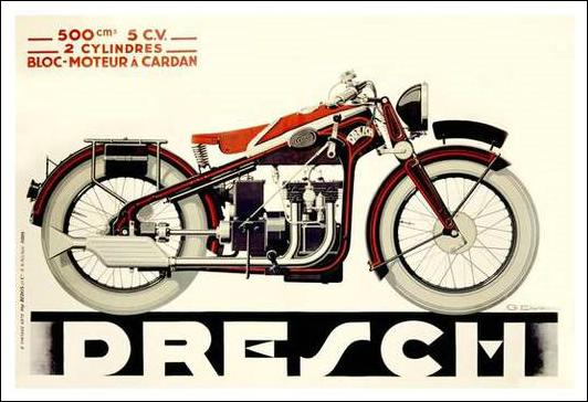 Advertentie uit 1935 van een niet meer bestaand bedrijf